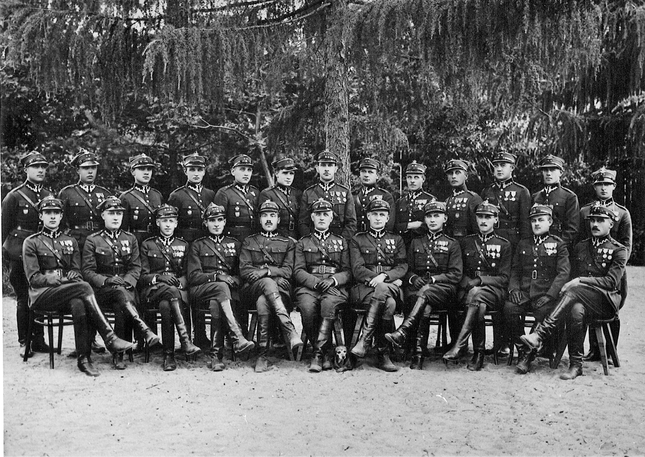 Korpus oficerski Batalionu Elektrotechnicznego w 1929 roku. Siedzą od lewej: por. Edward Fryzendorf, kpt. dr med. Aleksander Ciechanowski, kpt. Antoni Żarski, kpt. Wacław Szpinko, mjr Zdzisław Podgórski, mjr Wacław Szwykowski, kpt. Konstanty Majkowski, kpt. Józef Tarkowski, kpt. Stanisław Derejski, kpt. Mieczysław Niedzielski, por. Kazimierz Grüner. Stoją od lewej: N.N., por. Jan Górski, ppor. Władysław Buszko, N.N., por. Henryk Oszczakiewicz, por. Artur Oborski, kpt. Stanisław Michałowski, por. Henryk Gołębiowski, por. Jerzy Kempiners, por. Jan Wnęk, N.N., N.N., por. Stanisław Sulich.